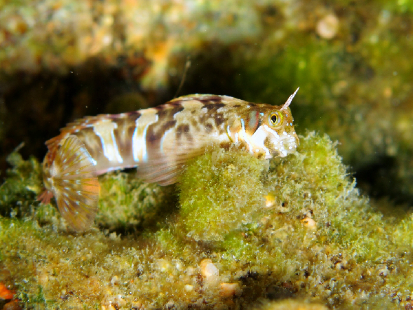 Aidablennius sphynx, Sardegna